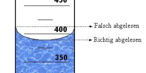 Wie liest man eine Skala am Messzylinder richtig ab?